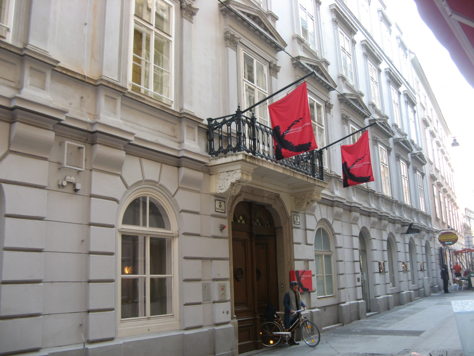 Bräunerstraße 5, Wien-Innere Stadt